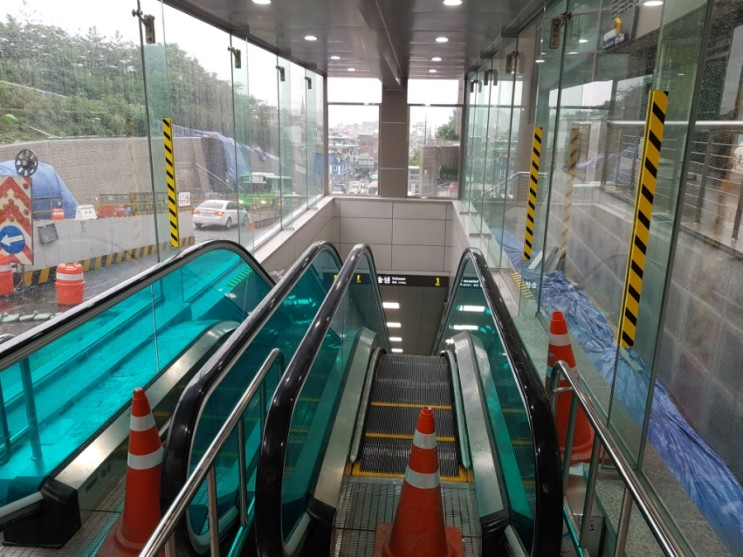 솔샘역 사진